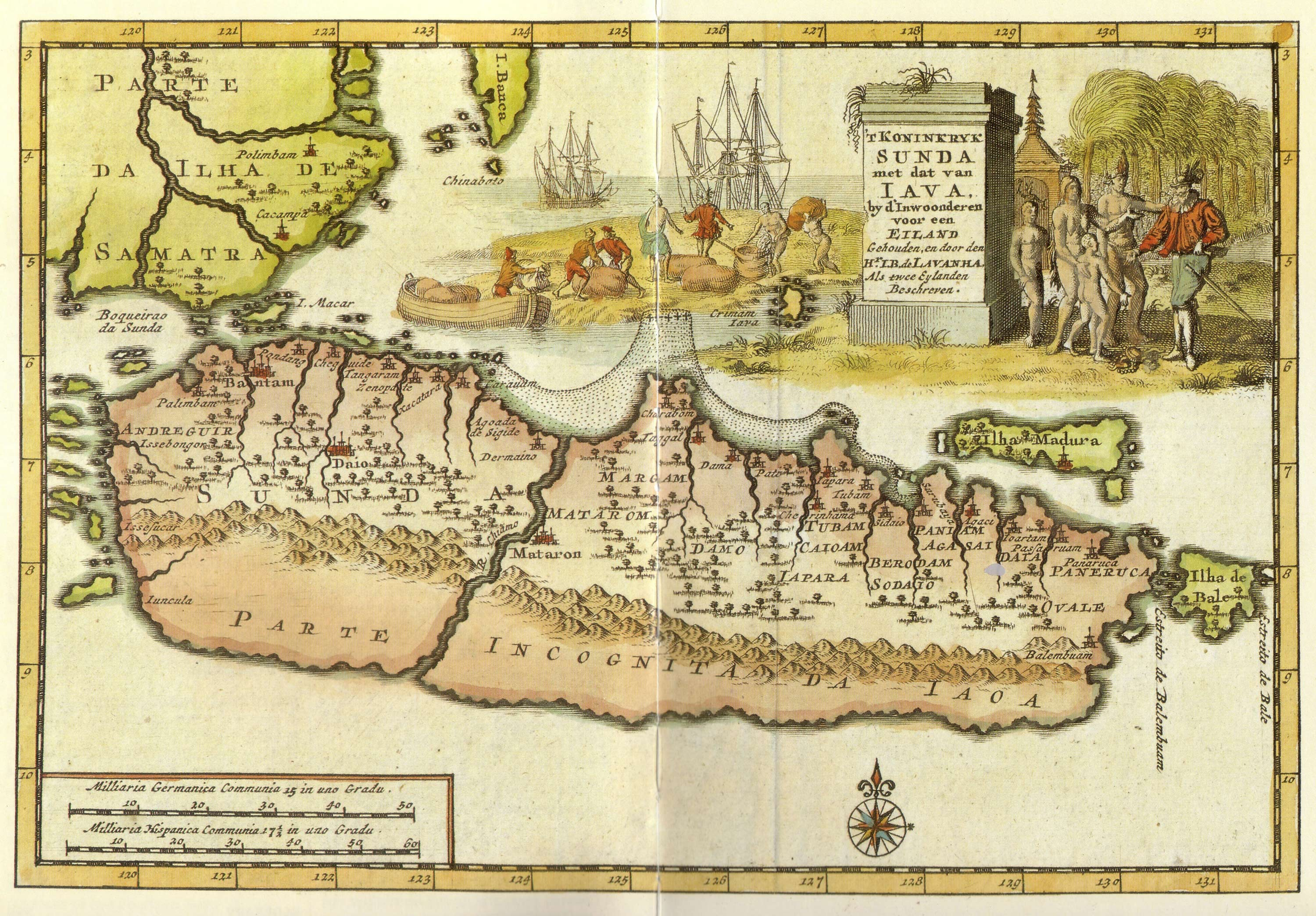 Bantam (Banten) Xacatara (Jayakarta) Cherebum (Cirebon) Taggal (Tegal) Margam (Semarang) Damo (Demak) Iapara (Jepara) Tubam (Tuban) Sodaio (Sedayu, now near Gresik) Surubaya (Surabaya)